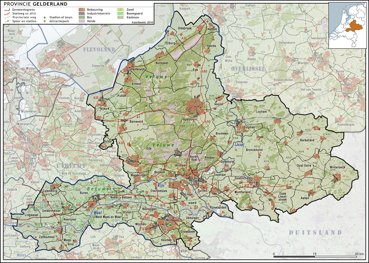 Provincie Gelderland, met indeling van gemeenten (2010) en impressie van het landschap. Door Jan-Willem van Aalst, samengesteld uit publiek beschikbare geo-data: Referentie-ondergrond (kustlijn, steden, wegen) gerasterd uit de OpenStreet Map OSM. ( Inhoud is beschikbaar onder de Creative Commons Attribution-ShareAlike 3.0 license. Referentie-ondergrond op water bewerkt vanuit Gebruik is vrij met bronvermelding NLR en ESA. Vectorgrenzen van gemeenten en regio's vrij ter beschikking gesteld met dank aan cartografen van brandweerregio's Hollands-Midden en IJsselland; gerasterd in Photoshop. Hoogte-aanduidingen (reliëf) gerasterd uit de AHN Viewer ( gebruik is vrij met bronvermelding (c) AHN, Overige kenmerken op de kaart: eigen tekenwerk van Jan-Willem van Aalst, op basis van gerasterde gemeentegrenzen.